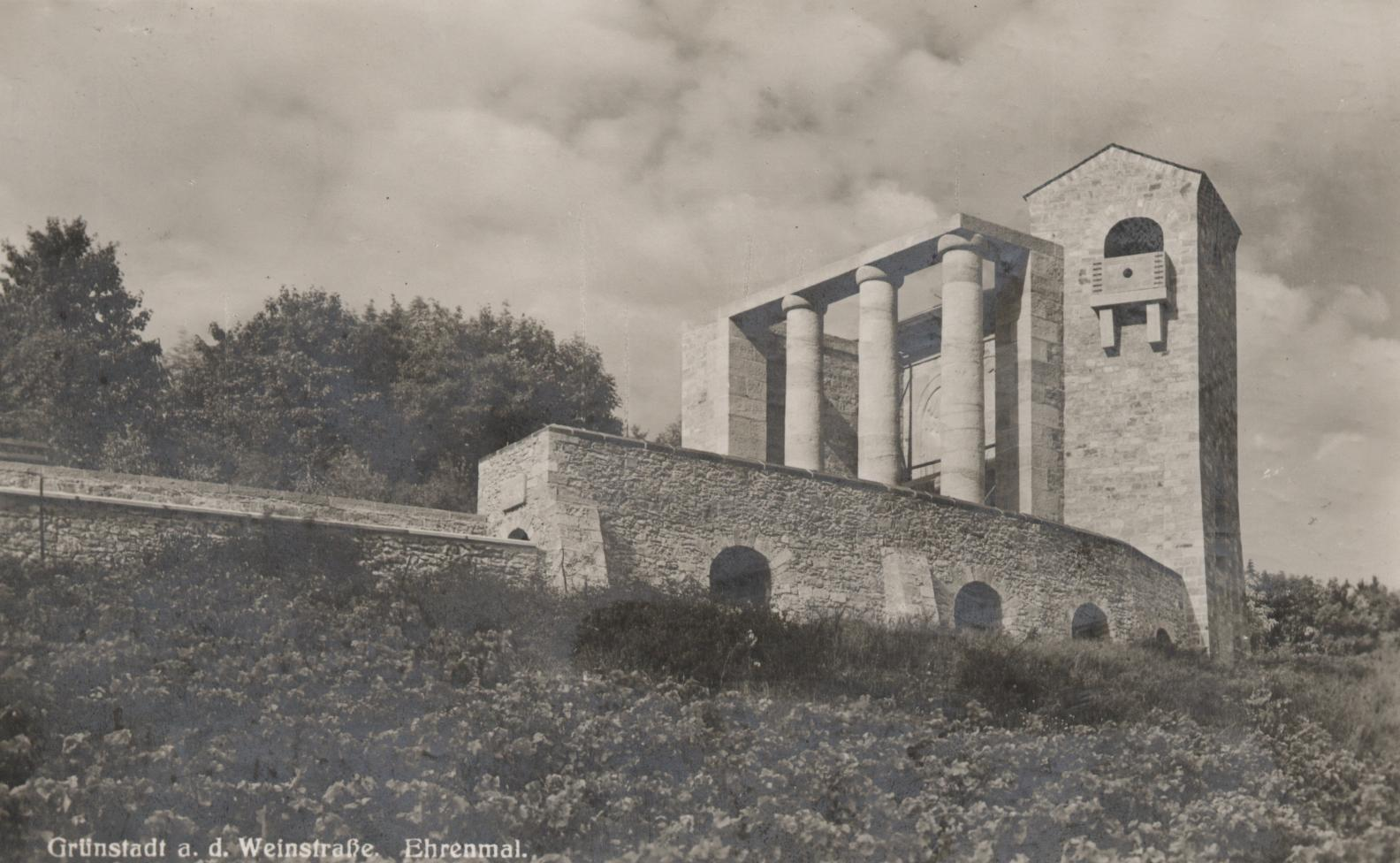 Grünstadt, Kriegerdenkmal